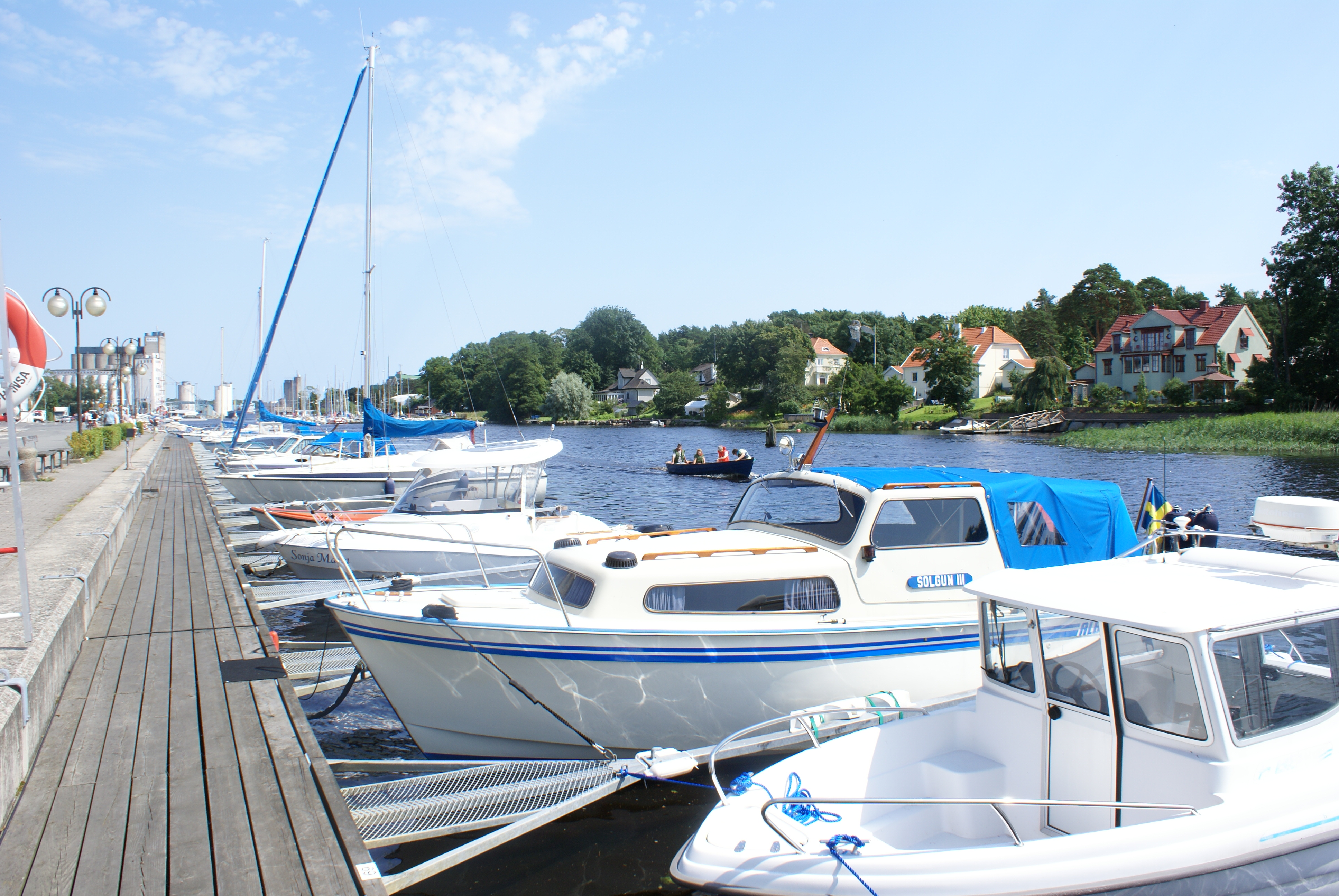 Hafen in Åhus im Juli 2007